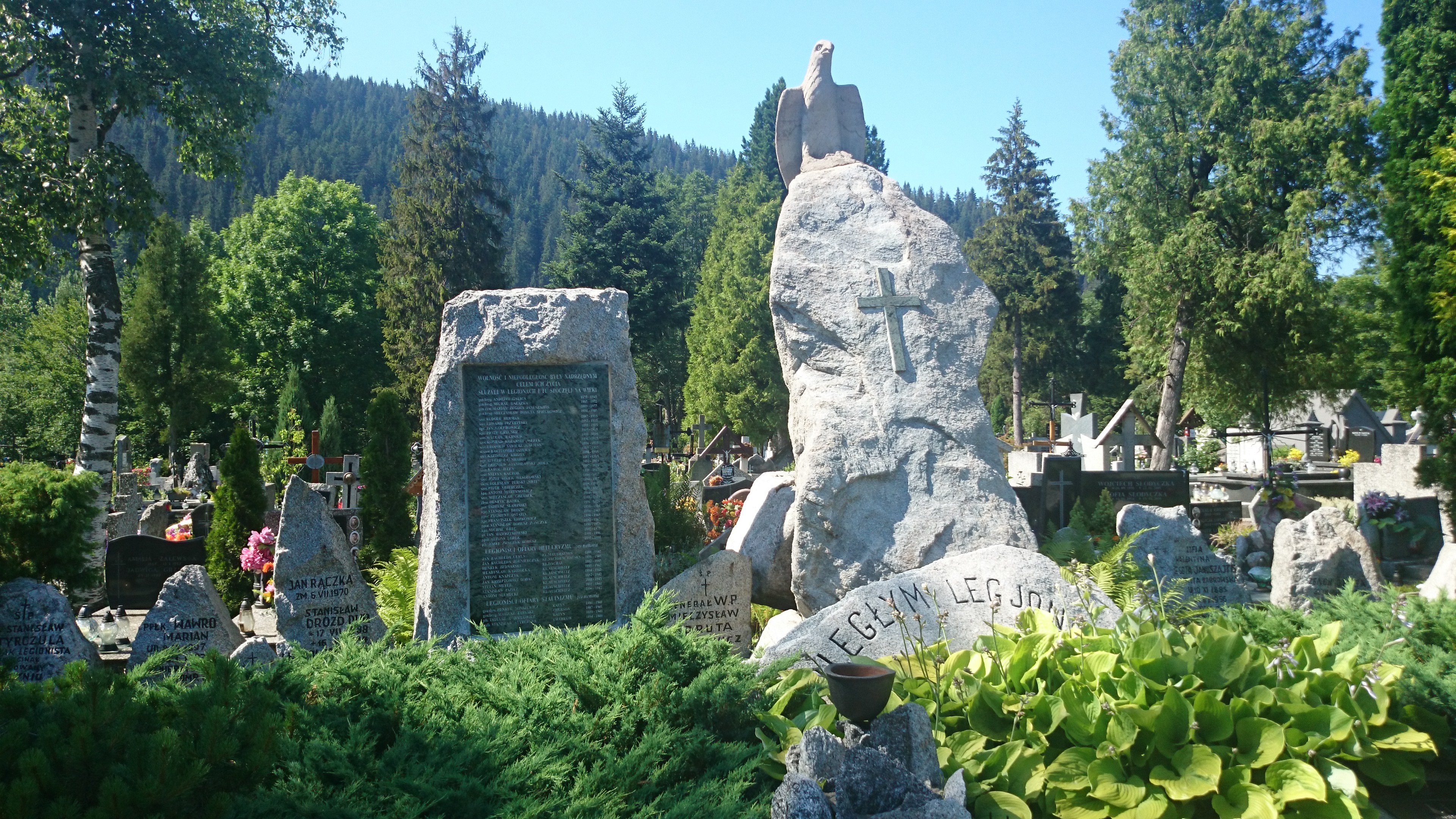 New Cemetery in Zakopane